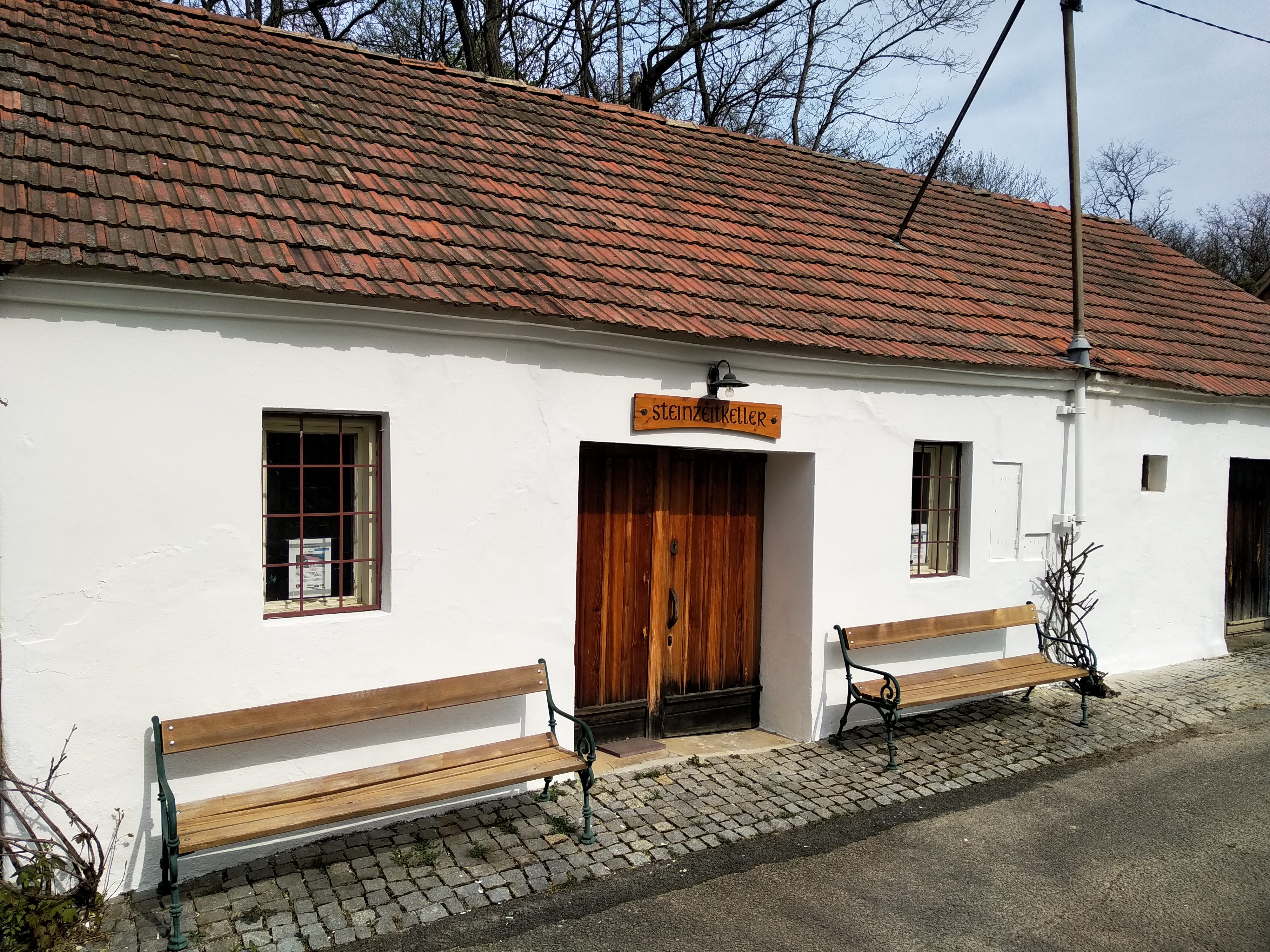 Außenansicht Steinzeitkeller 2051 Platt, Friedhofsleithen